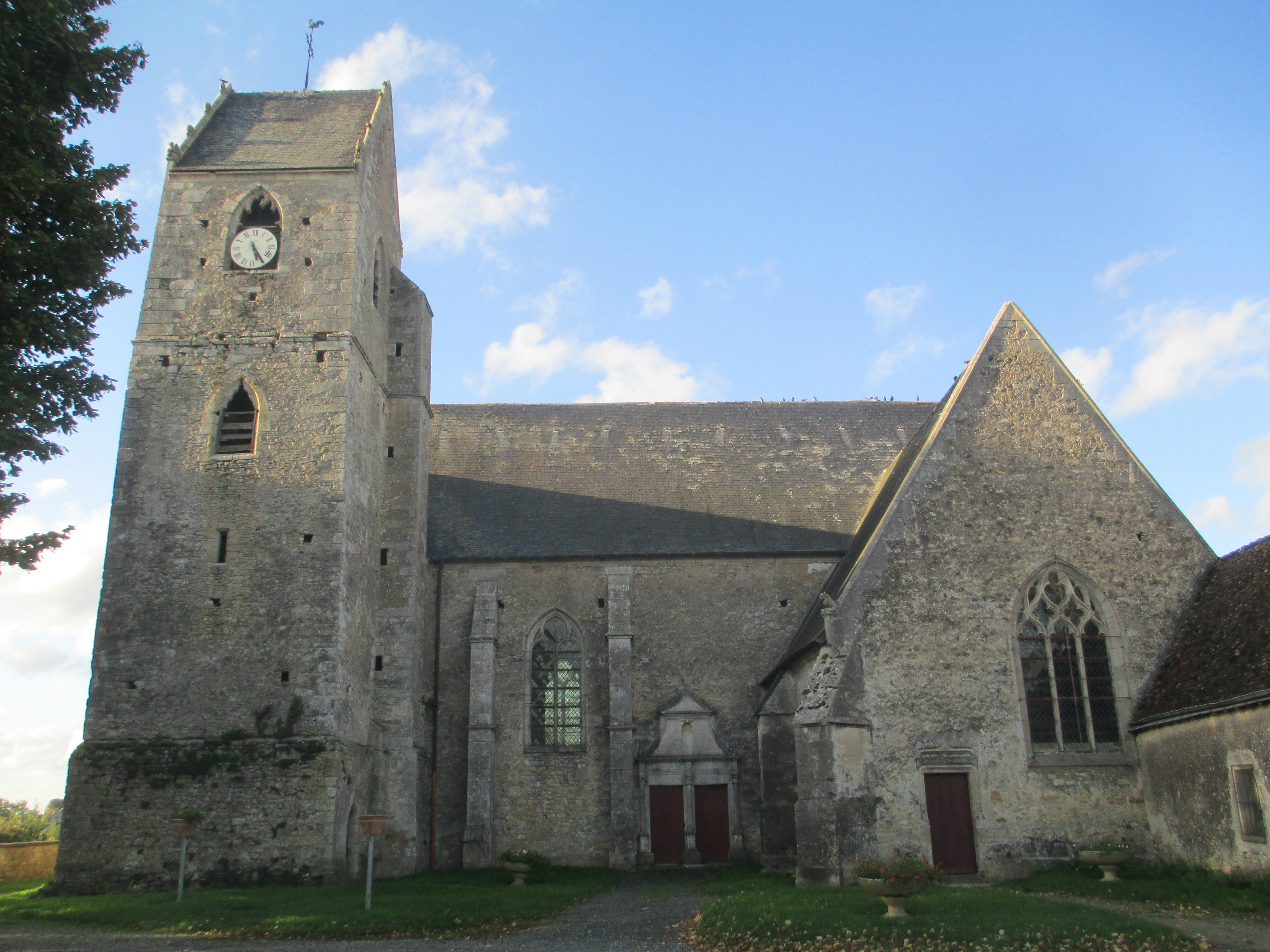 Église Saint-Rémy-et-Saint-Rigomer de Saint-Rémy-du-Val, dans la Sarthe. .